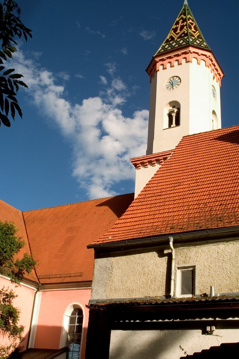 Kirche "Mariae Himmelfahrt" in Altenstadt (Iller), Ortsteil Illereichen Church "Mariae Himmelfahrt" in Altenstadt (Iller), Germany, suburb Illereichen Stefan Kaufmann, 2005